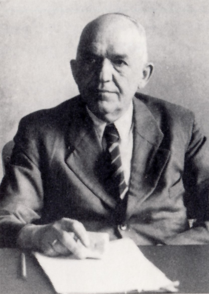 Dr. Adolf Franz Beck (1892 - 1949) – Pionier der Magnesium-Metallurgie